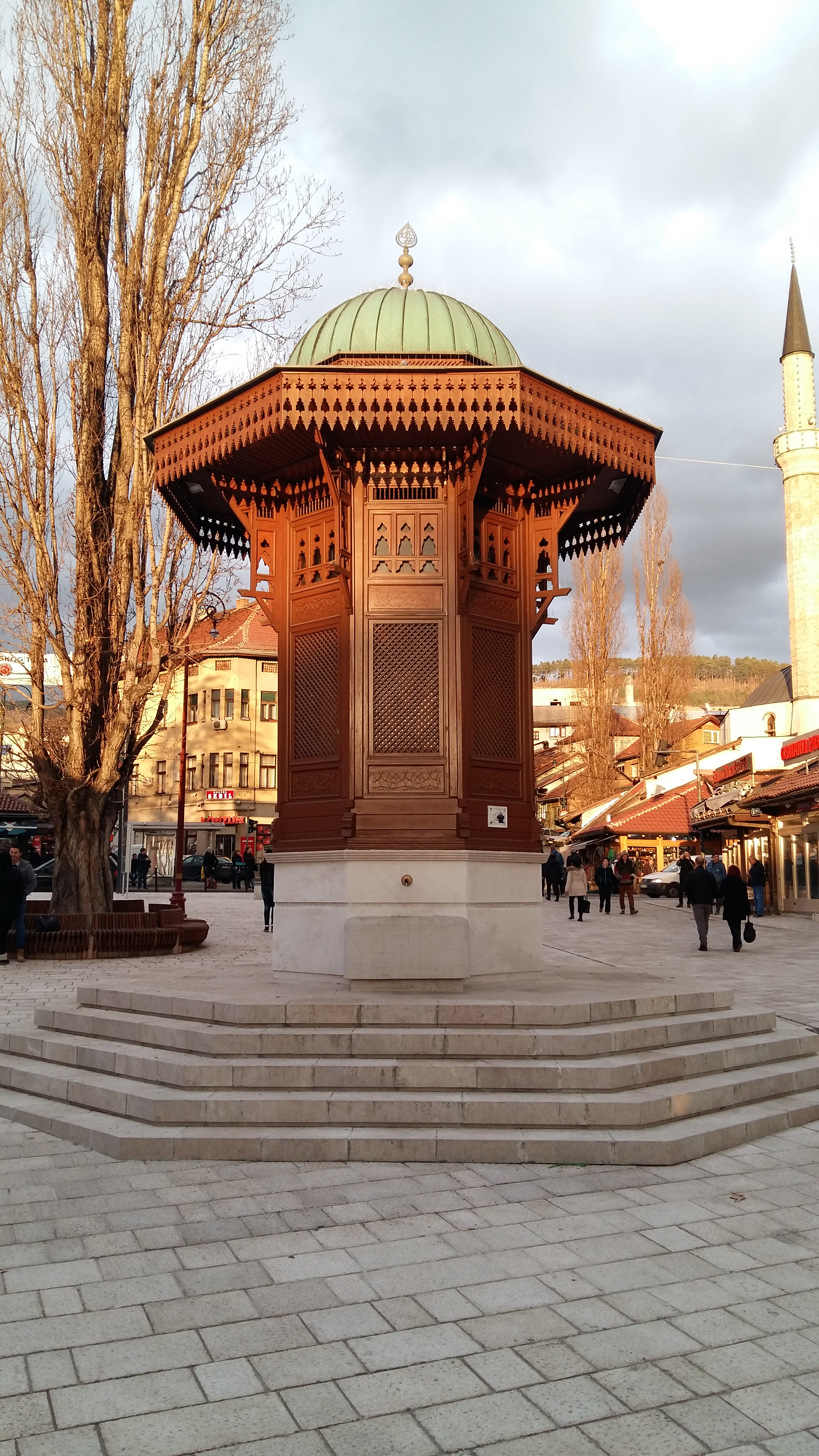 Sebilj in 2016